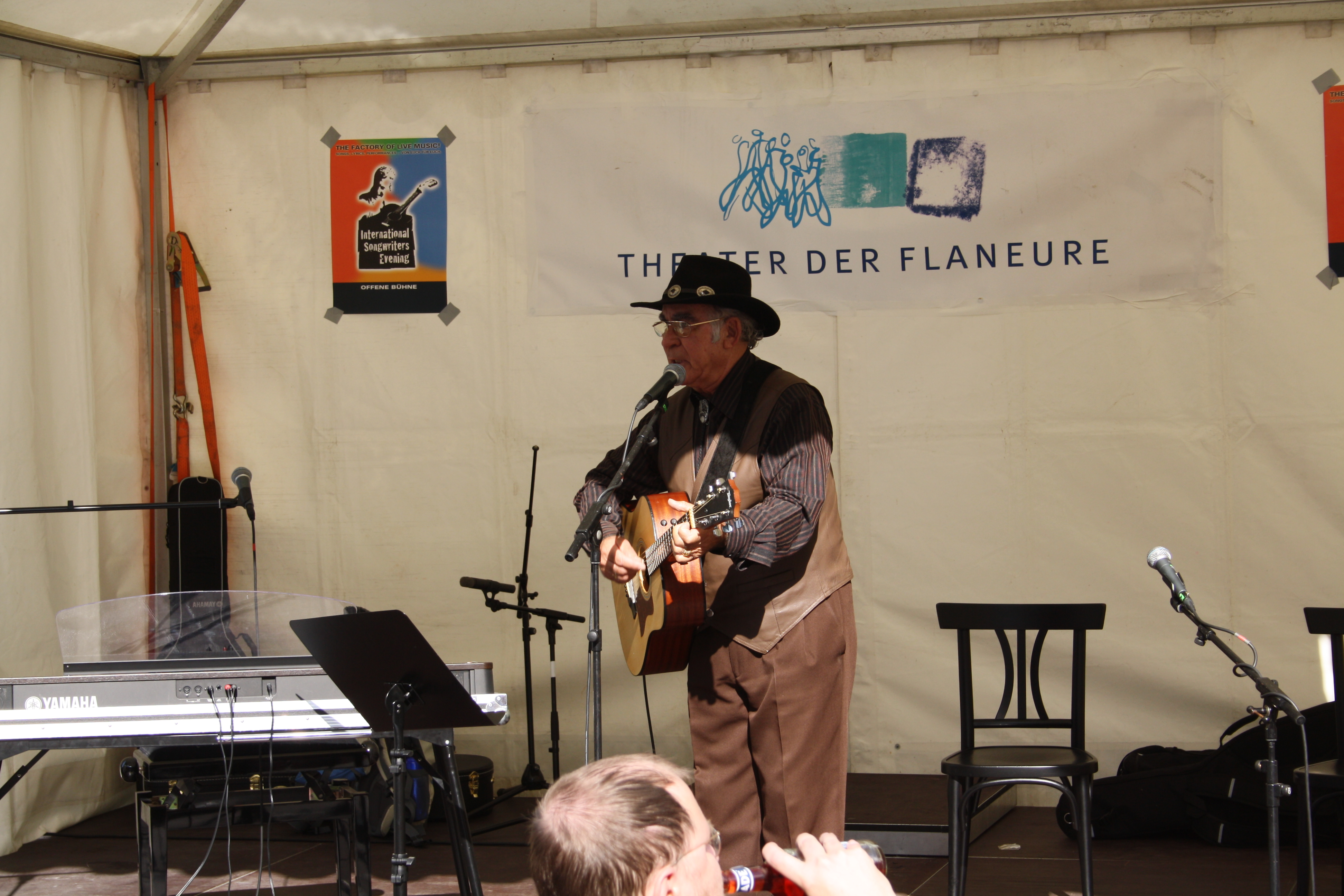 Musiker auf dem Streetlife Festival/Corso Leopold